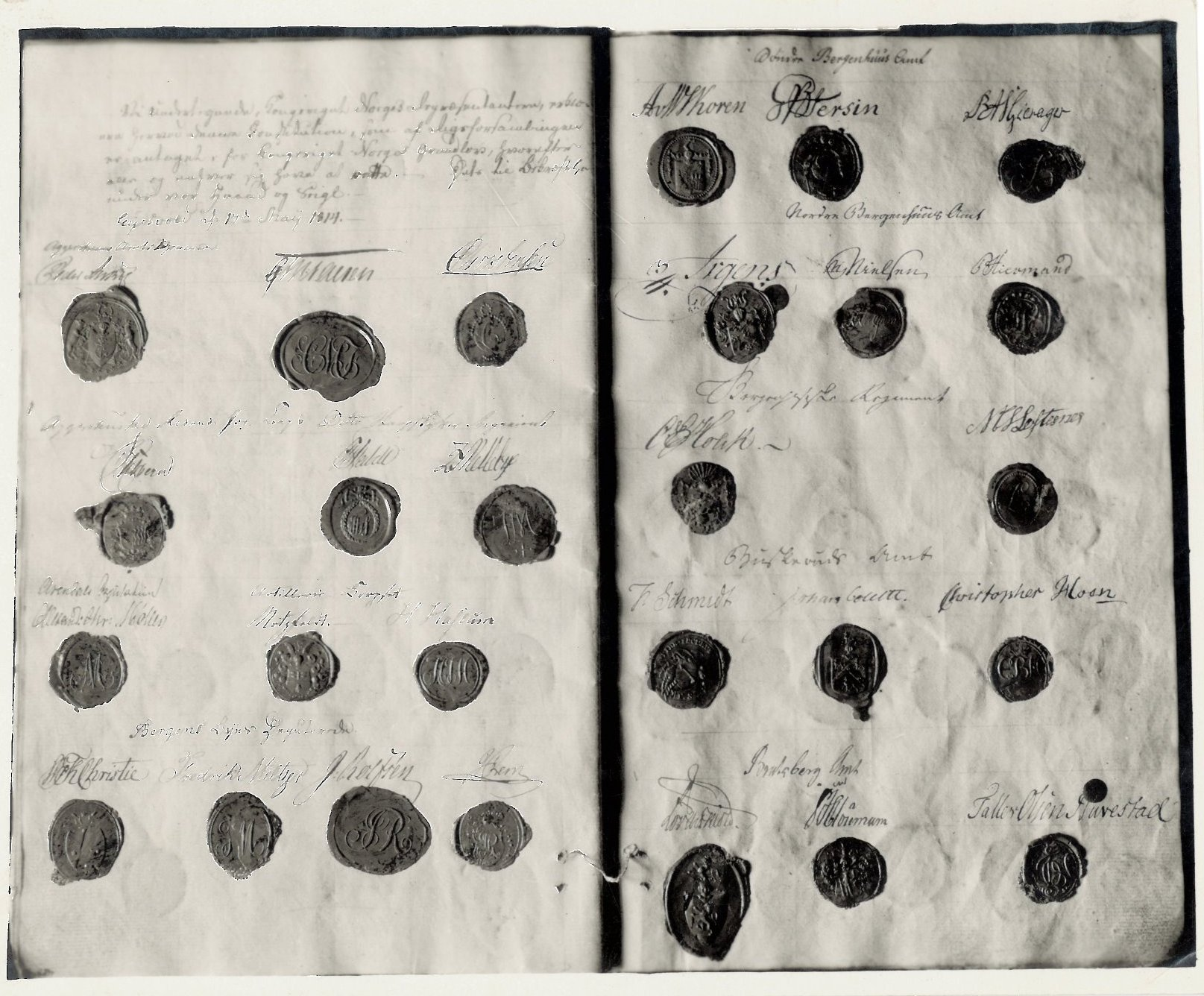 Format: Fotopositiv Dato / Date: 1930 Fotograf / Photographer: Ukjent Sted / Place: Trondheim Wikipedia: Norges Grunnlov Wikipedia: Constitution of Norway Eier / Owner Institution: Trondheim byarkiv, The Municipal Archives of Trondheim Arkivreferanse / Archive reference: Tor.H4x.Bxx.Fxxxx Merknad: Norges Grunnlov utstilt i Trondheim under Olavsjubileet i 1930. Hentet fra privatarkivet etter Claus Hjelte.